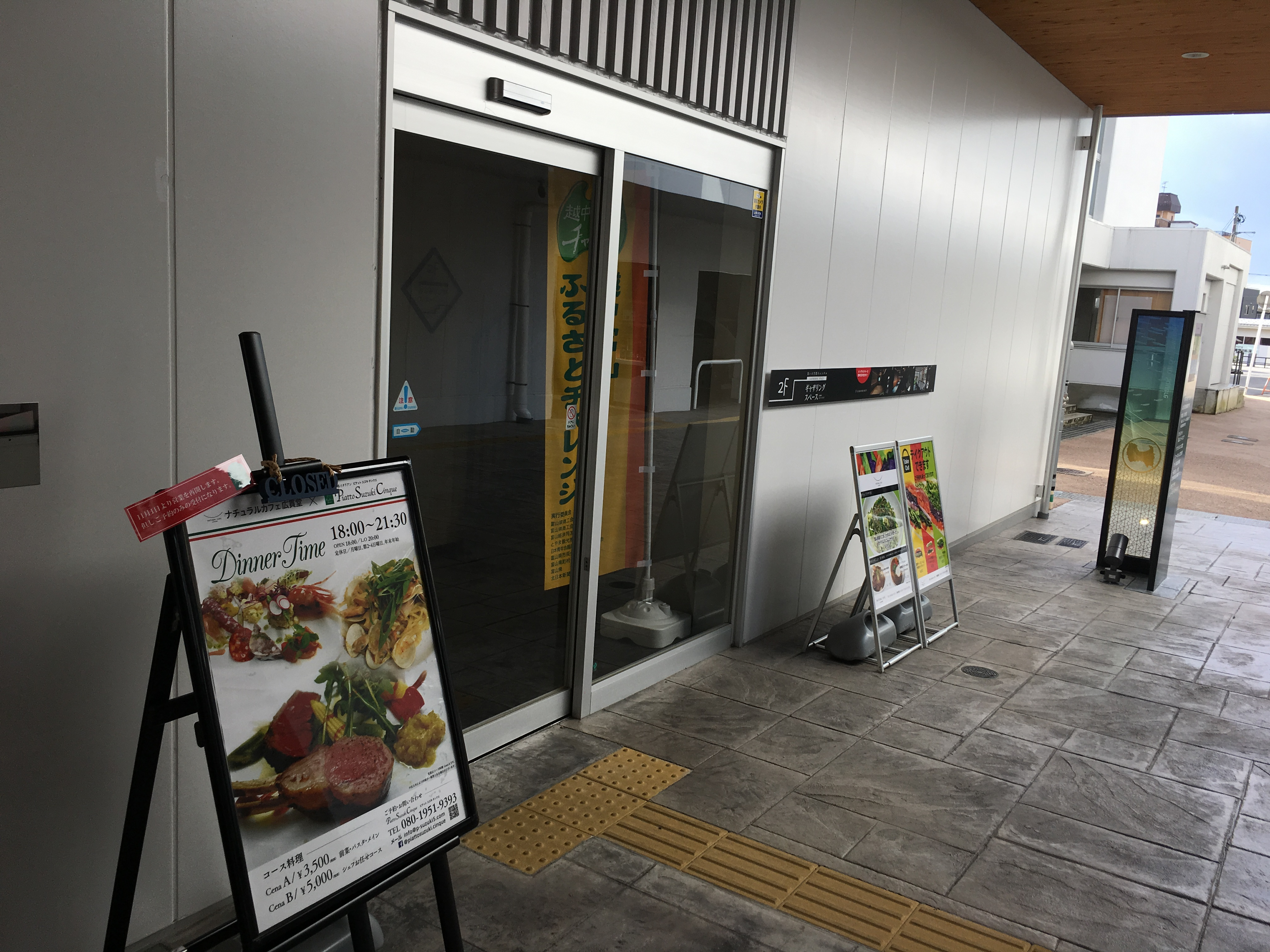 ナチュラルカフェ by 廣貫堂入口